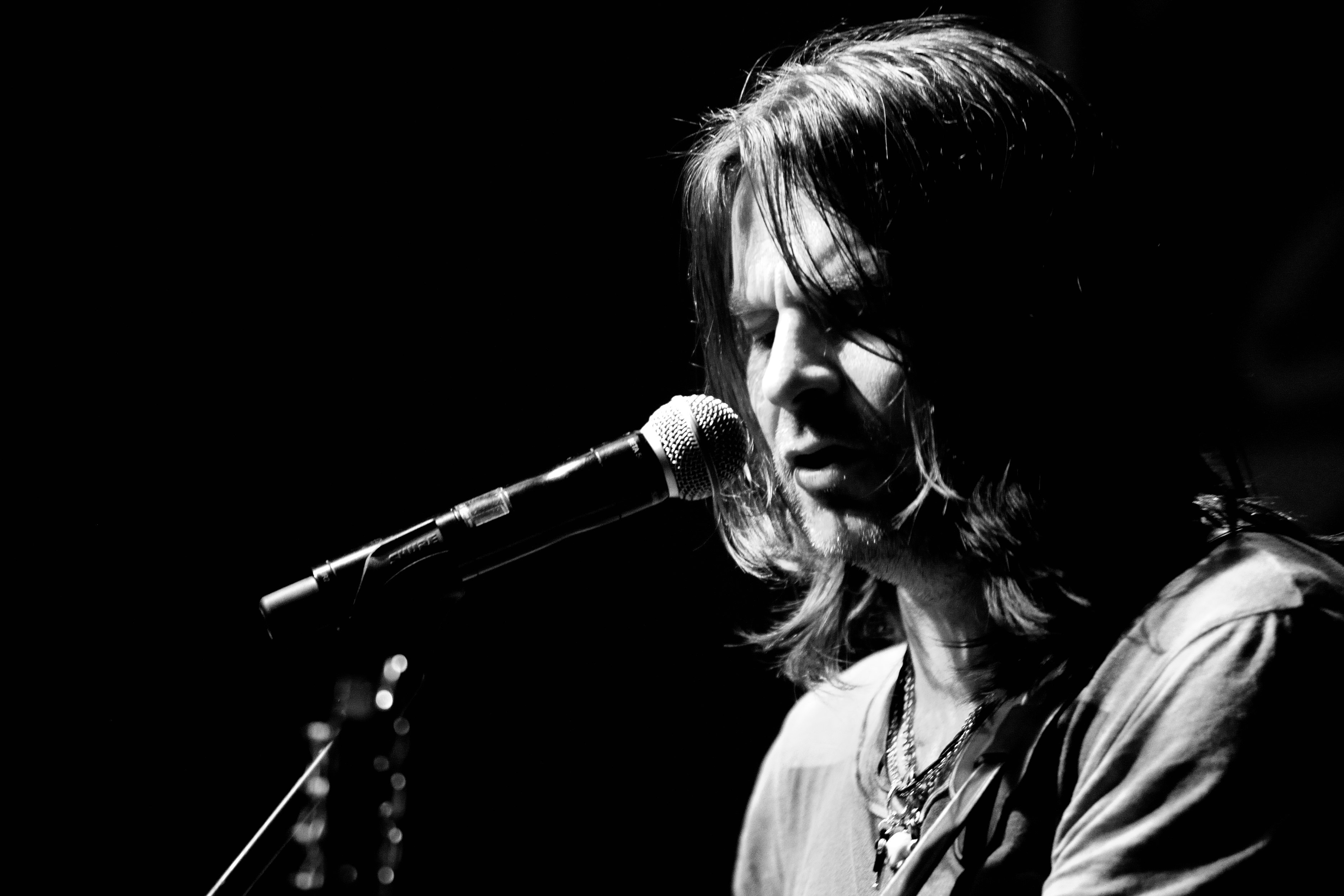 Ray Wilson während eines Konzerts am 07.04.2013 in der "Blues Garage" Isernhagen, Deutschland